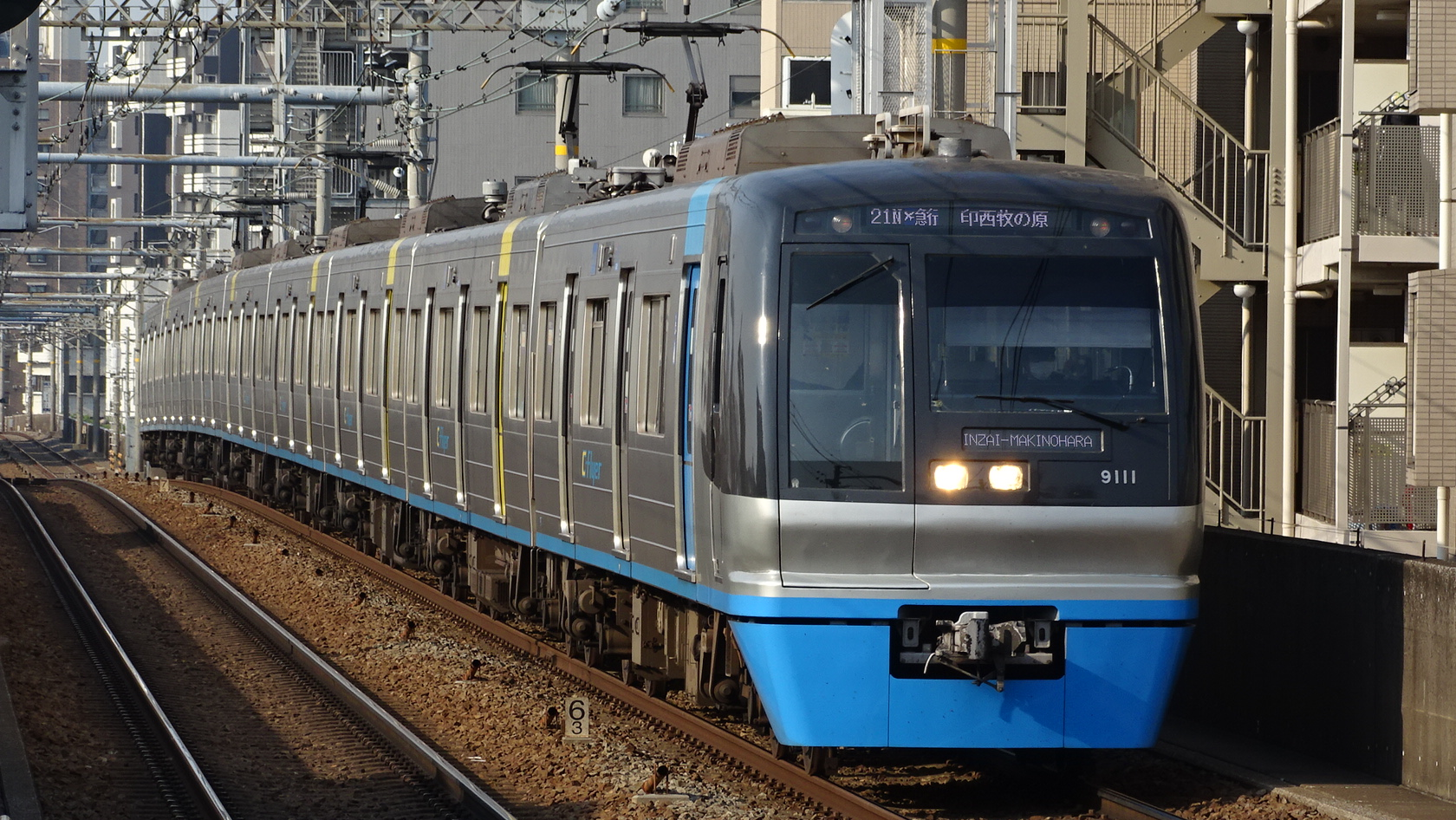 前照灯LED化された現北総鉄道9100形。令和02年4月30日、京急本線立会川駅にて撮影 Sony Cyber-shot DSC-HX400V